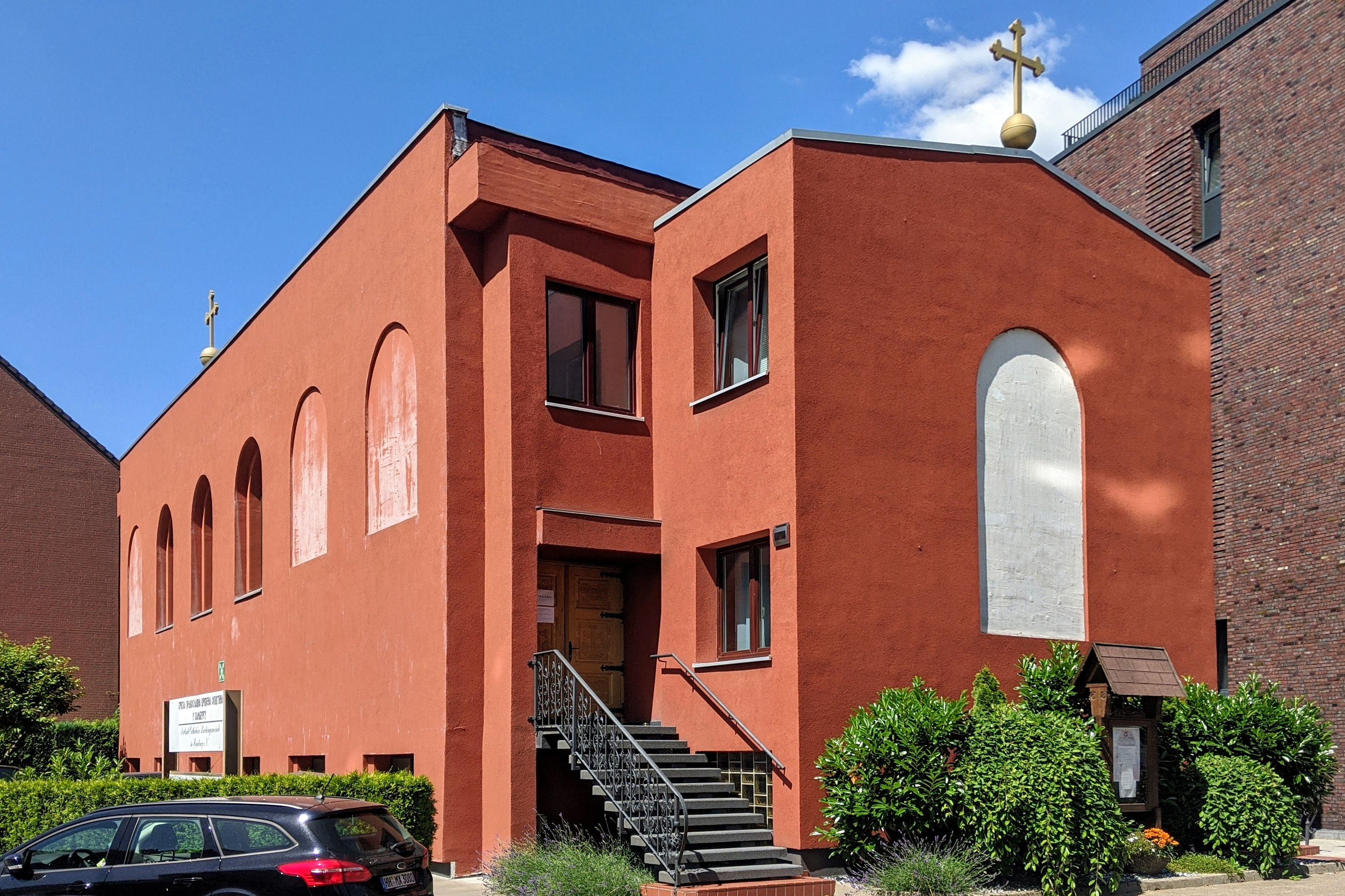 Serbisch-Orthodoxe Kirche im Hamburger Stadtteil Eilbek, Schellingstraße 9, Zustand 2020